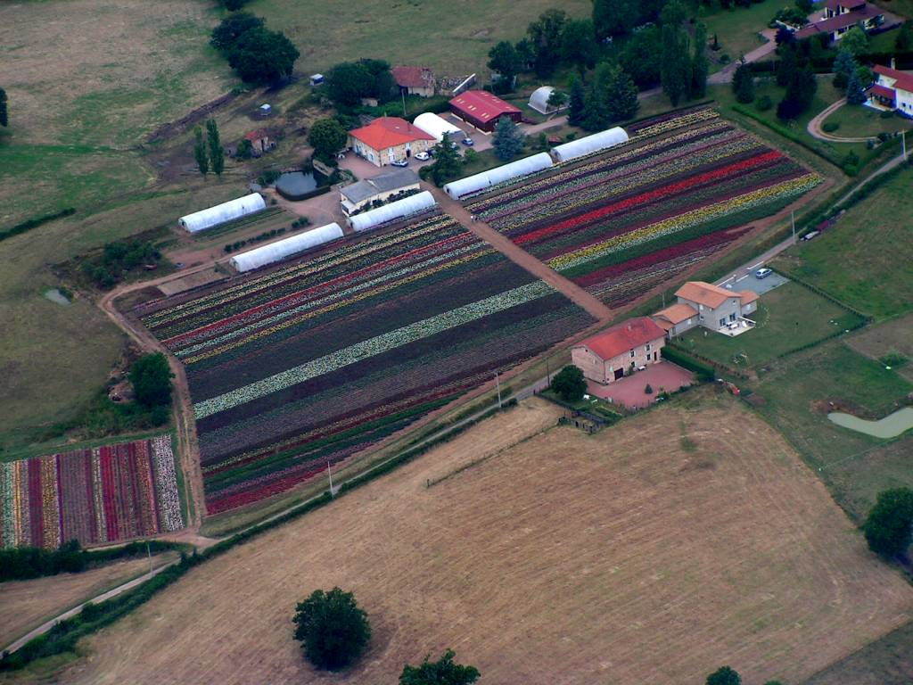 Vue d'avion